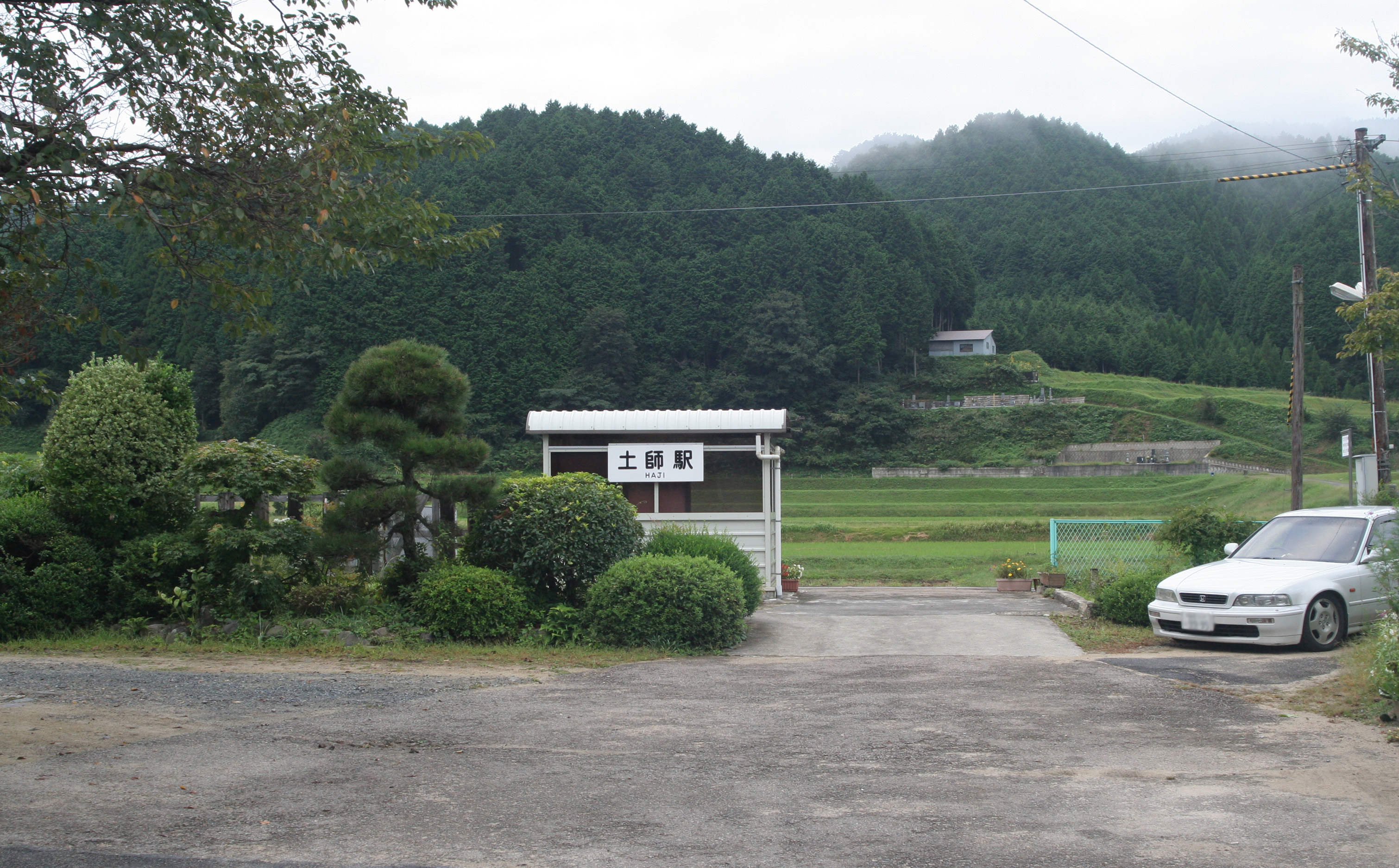 西日本旅客鉄道 JR因美線 土師駅